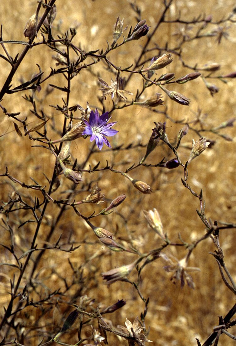 Malesherbia linearifolia, Malesherbiaceae - Chile, Santiago de Chile, Cerro San Cristóbal